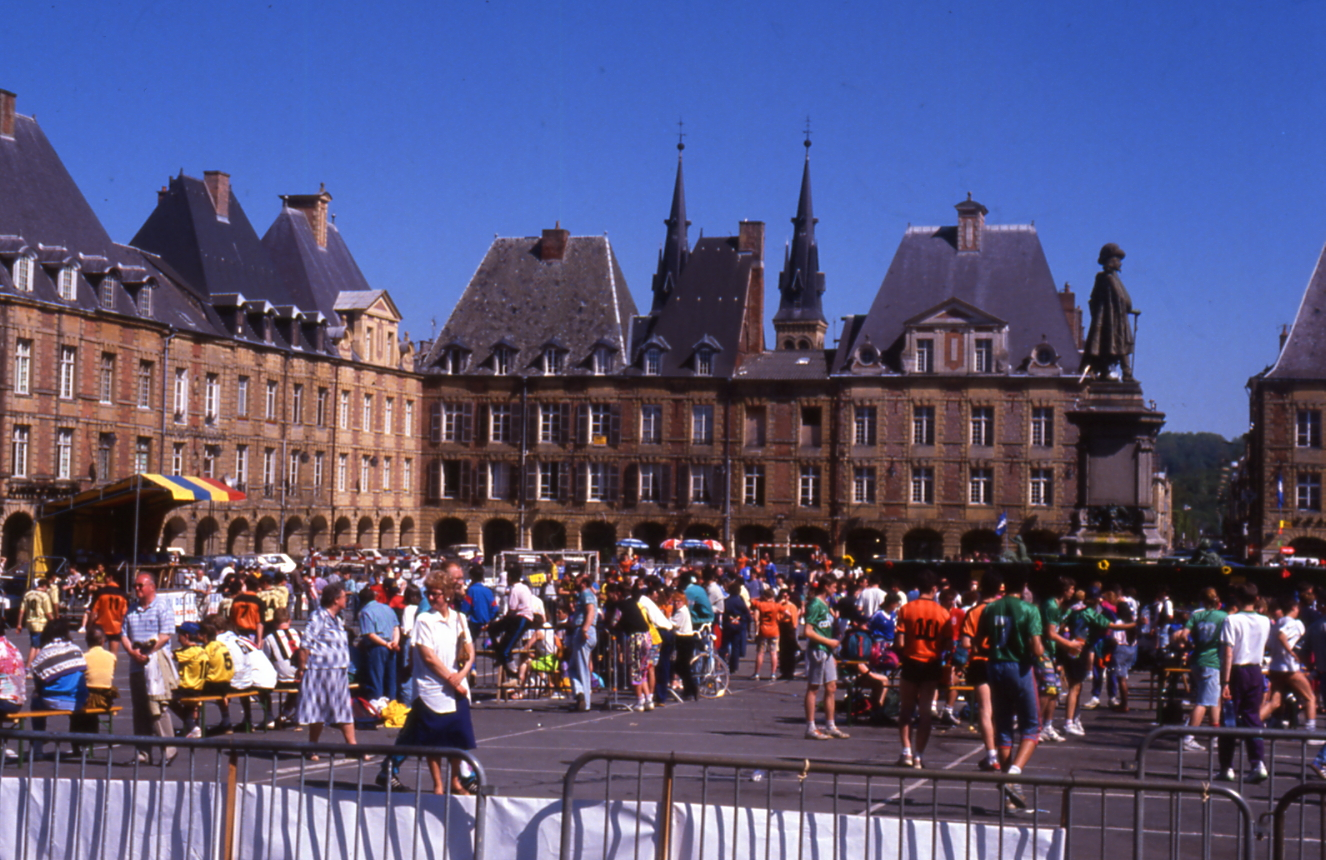 place Ducale in Charleville-Mézières